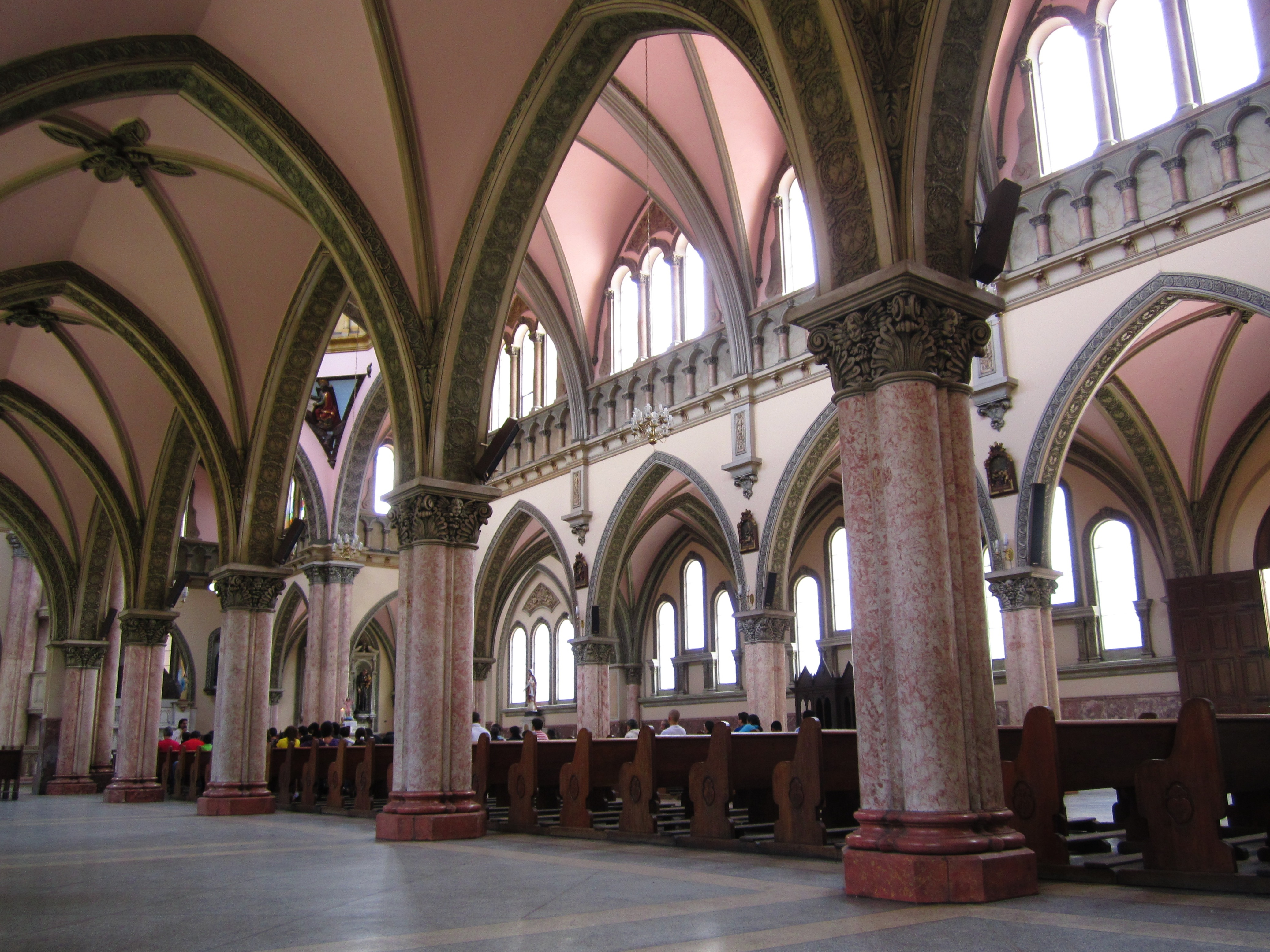 Bogotá, iglesia de la Sagrada Pasión carrera 17 con calle 16, barrio San Victorino.